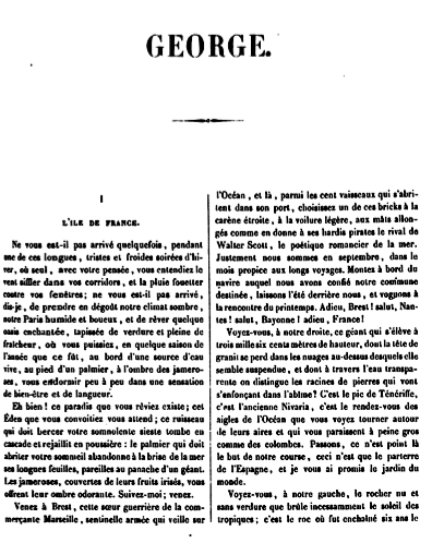 Alexandre Dumas.- Oeuvres de Alexandre Dumas, 7, Georges, Bruxelles, Société Belge de Libraire, 1844, p. 301.